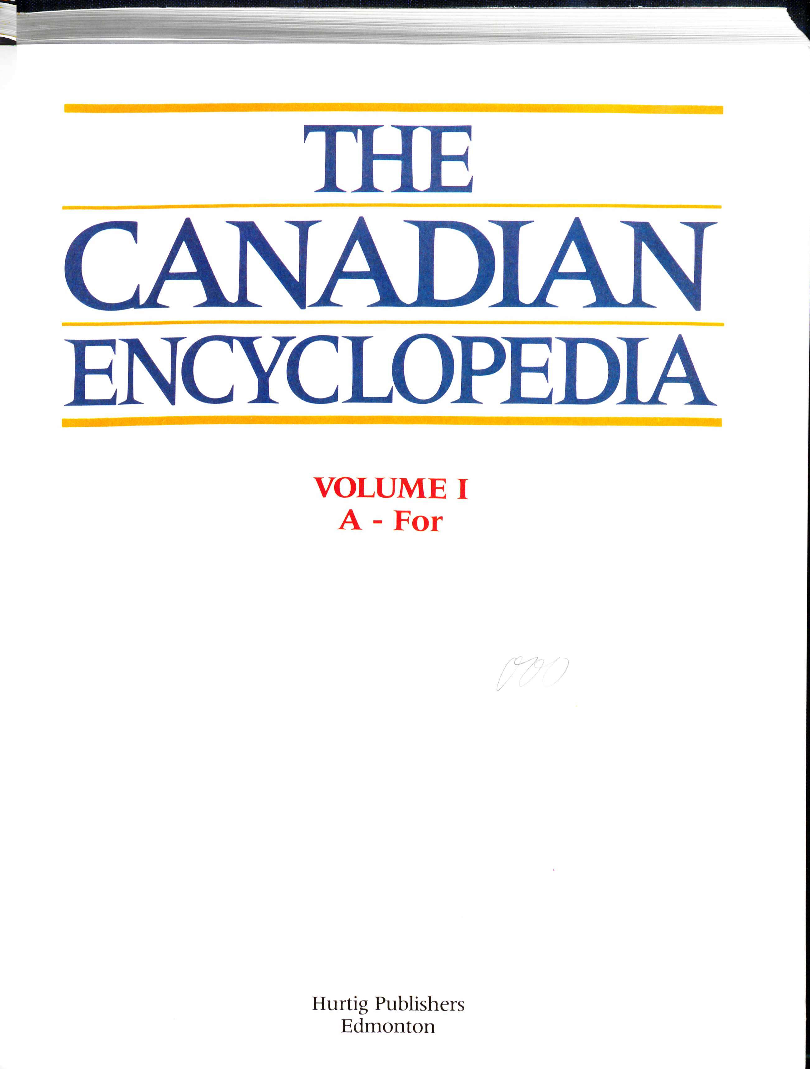 The Canadian Encyclopedia 1985 Title